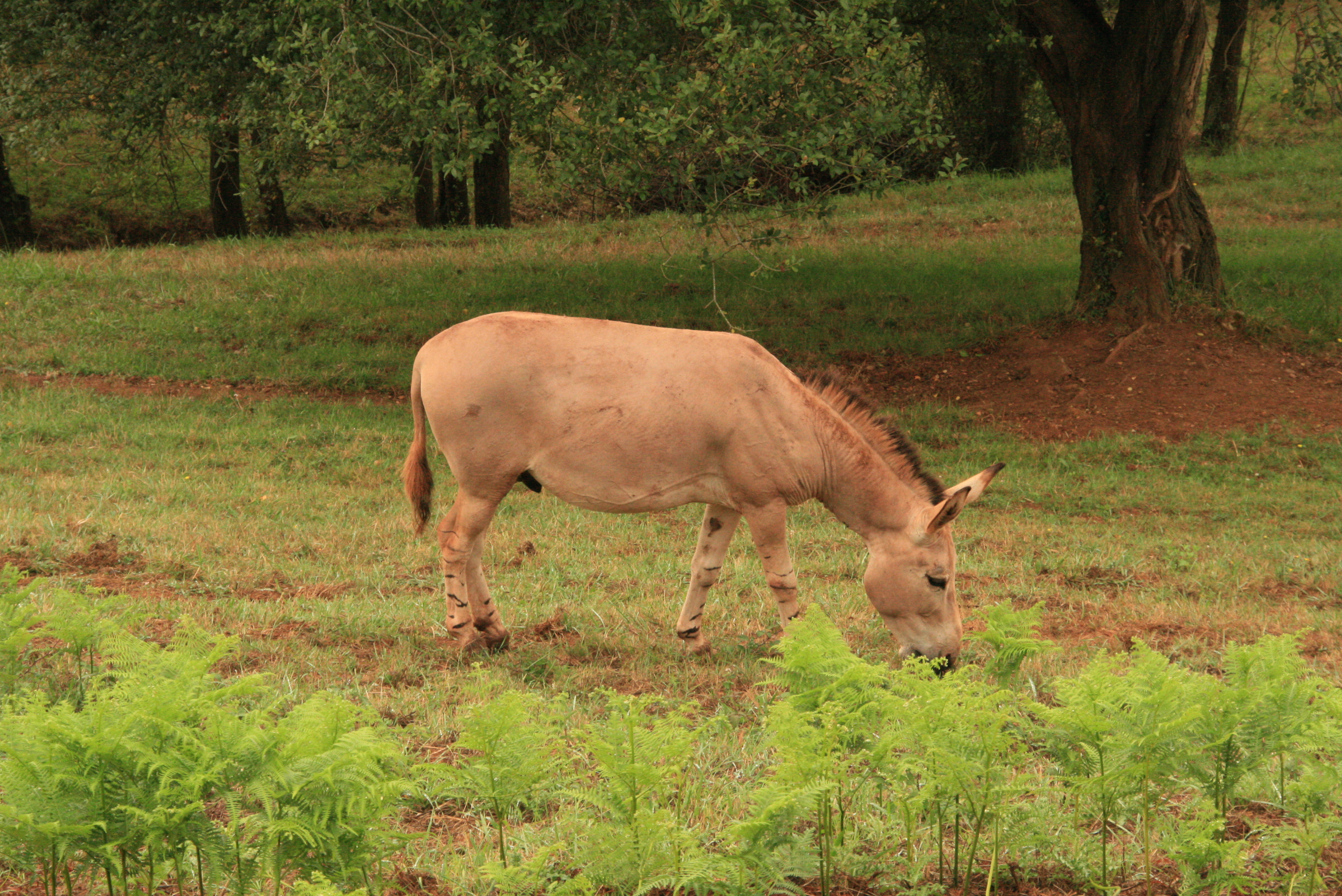 Asno somalí en el Parque de la naturaleza de Cabárceno